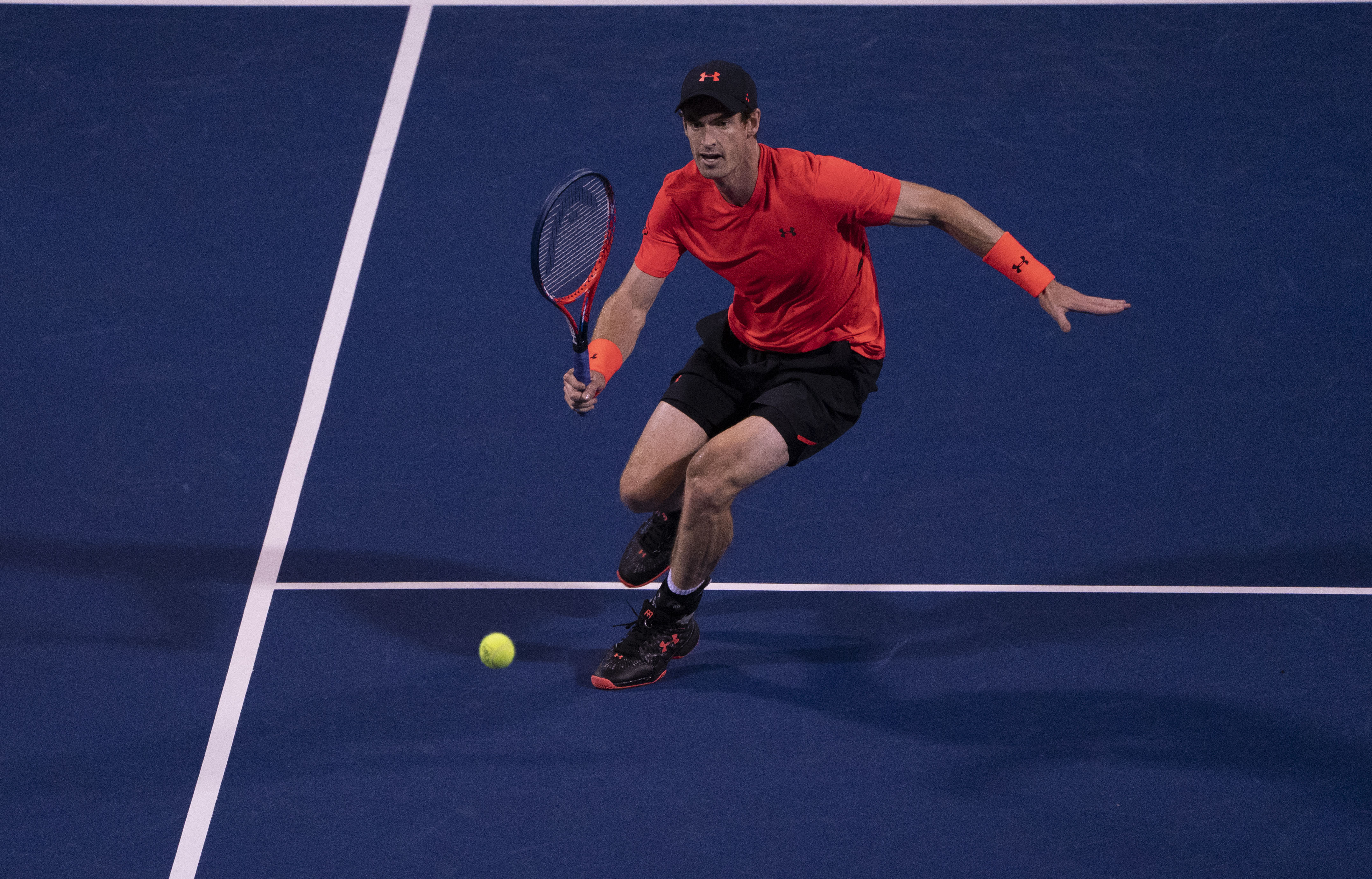 2018 Citi Open Tennis